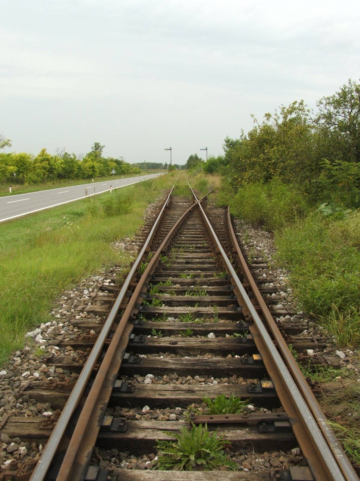 A Szabadka–Zenta–Óbecse-vasútvonal és a Horgos–Zenta-vasútvonal elágazása Zenta közelében. A képen Szabadka felé nézünk.